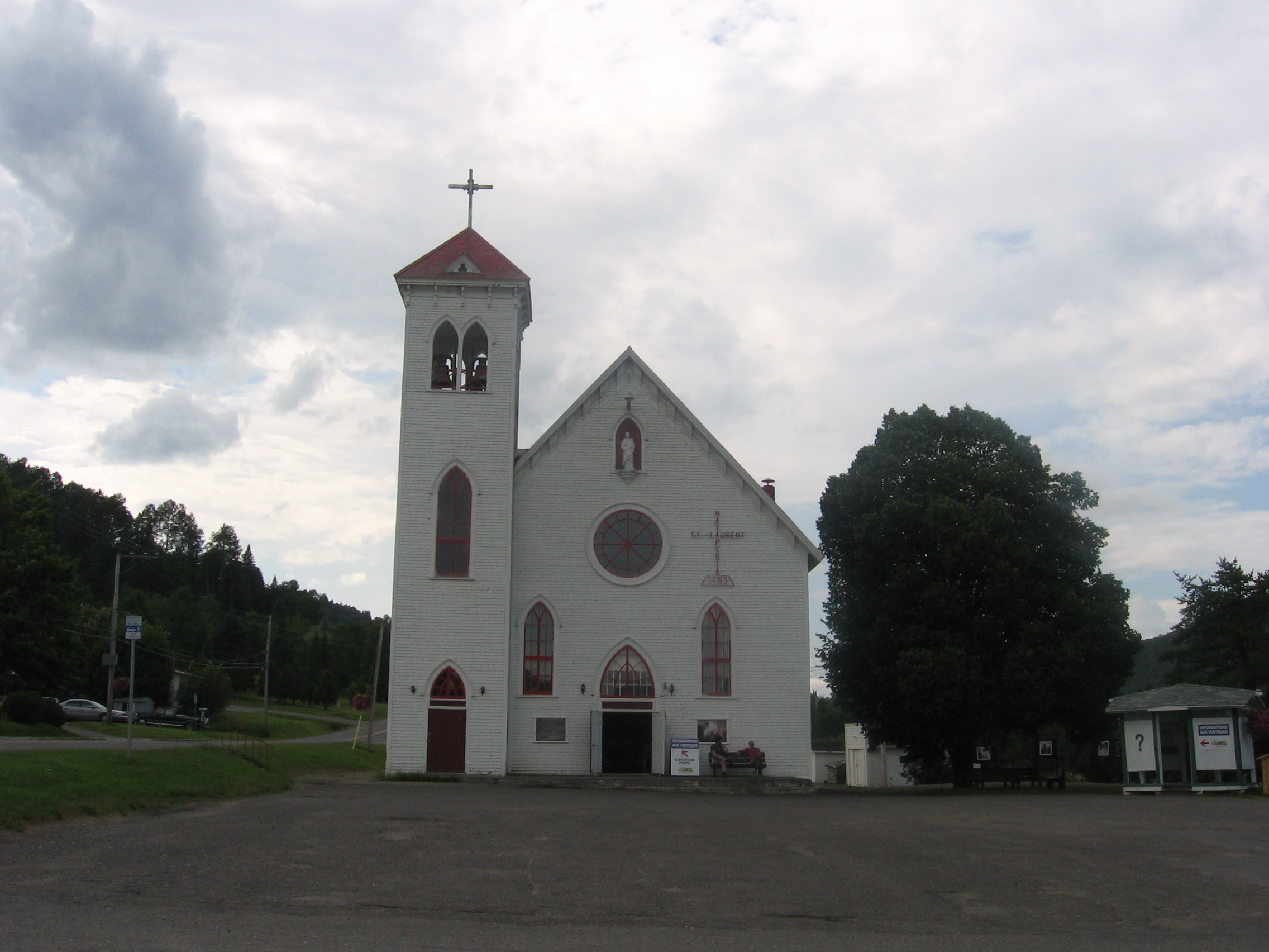 Église de Saint-Laurent-de-Matapédia